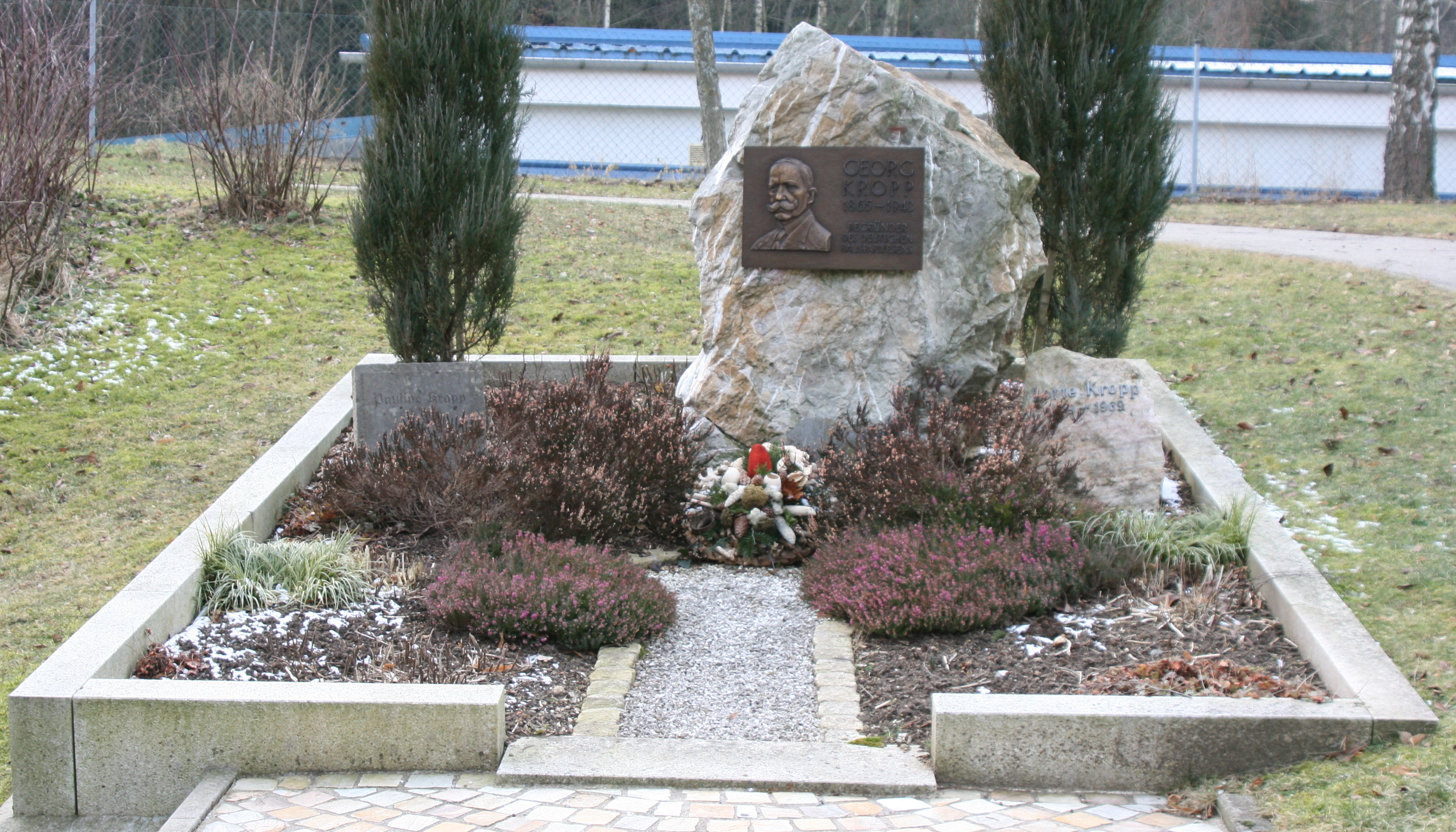 Ehrengrab Georg Kropps auf dem Wüstenroter Friedhof